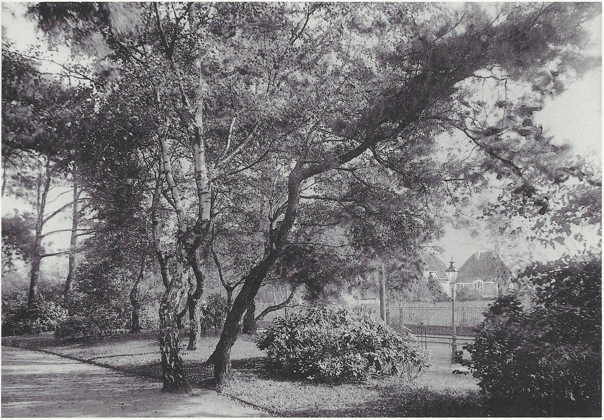 Südpark, Köln-Marienburg; im Hintergrund Häuser der Lindenallee